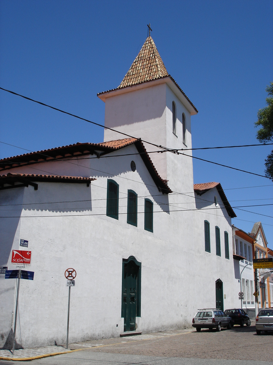 Imagem da cidade de Mogi das Cruzes.